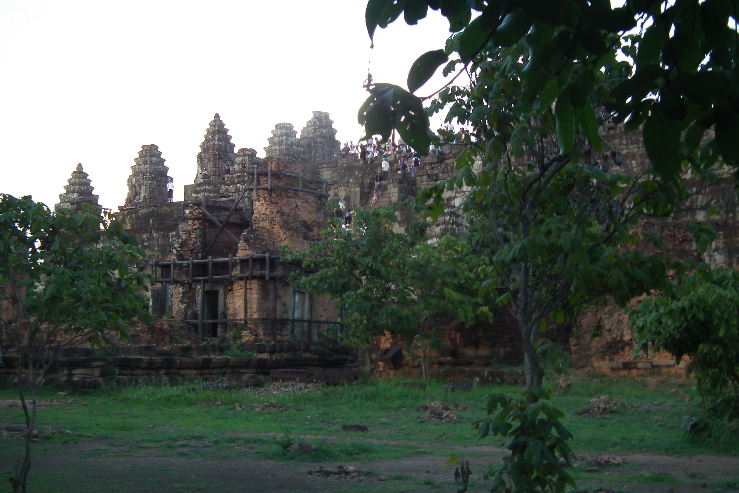 Angkor Phnom Bakheng アンコール・プノンバケン